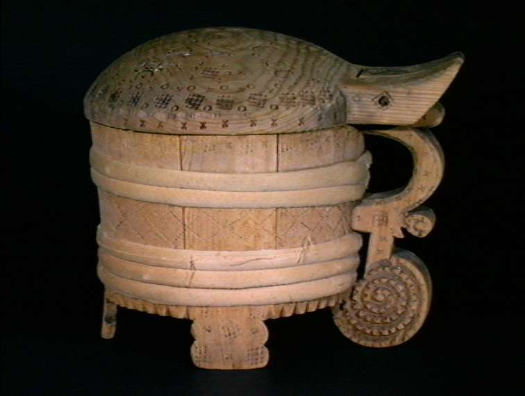 Lagget smørkanne av furu, datert 1781, fra Hardanger i Hordaland. Høyde 26 cm. Foto Anne-Lise Reinsfelt / Norsk Folkemuseum.